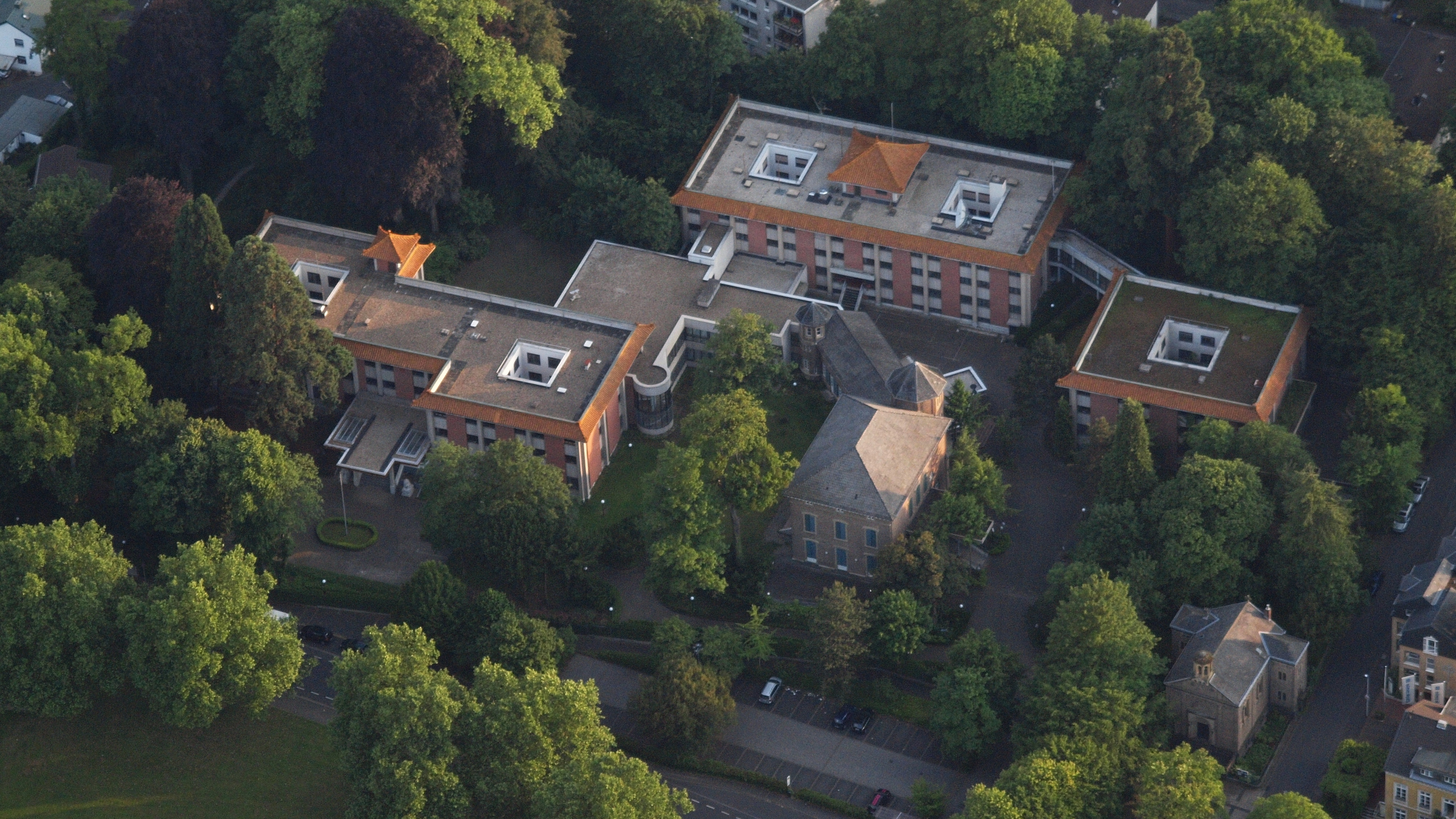 Ehemaliges Kanzlei- und Residenzgebäude der Botschaft der Volksrepublik China, Kurfürstenallee 12/Friedrich-Ebert-Straße 59, Bad Godesberg: Luftaufnahme